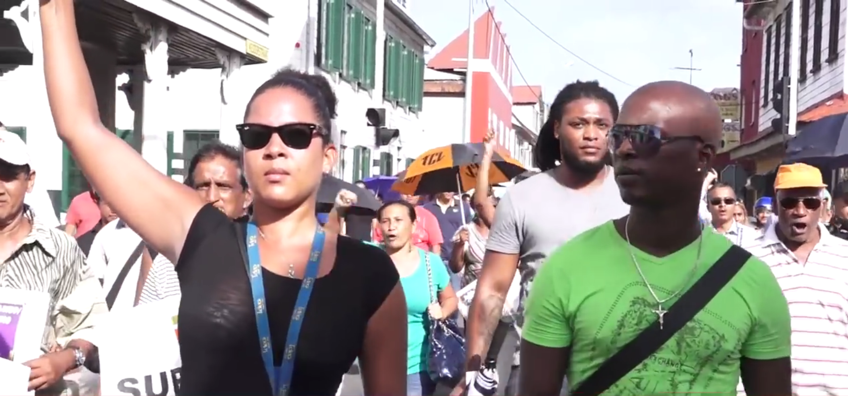 Maisha Neus en Siebrano Pique, 2017